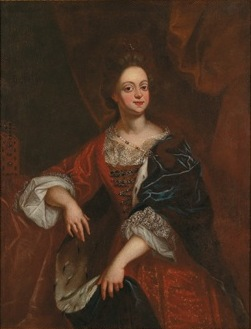 Wilhelmine Amalie de Brunswick-Lünebourg (1673-1742), épouse de Joseph Ier du Saint-Empire